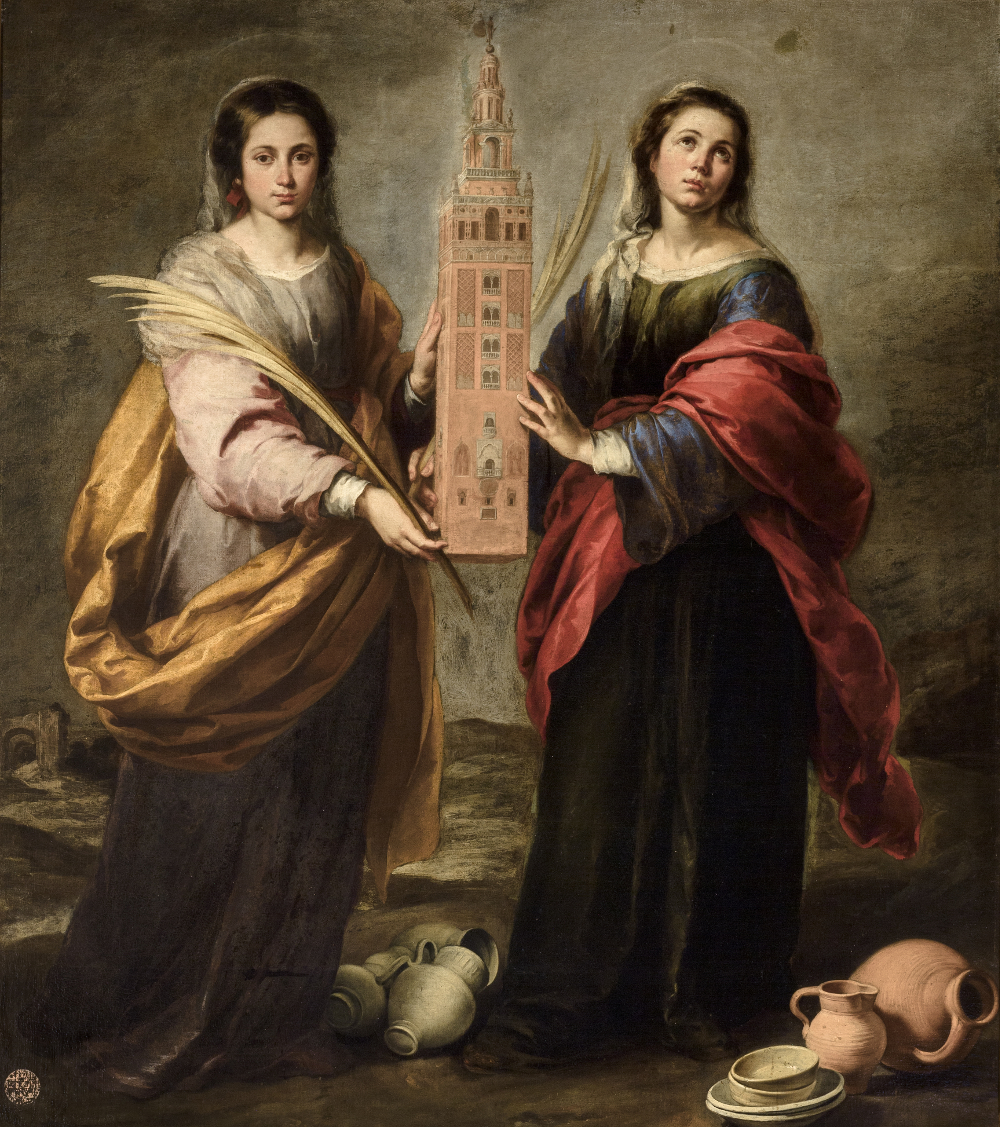 La obra representa a las vírgenes y mártires Santa Justa y Santa Rufina, y pertenece a la serie realizada por Murillo para la iglesia del convento de Capuchinos de Sevilla, donde se situaba en el retablo mayor. Las santas, que son prototipos de belleza popular sevillana, es una de las pinturas más famosas del pintor, y las hermanas aparecen representadas con las palmas del martirio y con unas vasijas de barro alusivas a su condición de vendedoras de cerámica. En sus manos sostienen la torre de la catedral de Sevilla, La Giralda, pues según la tradición evitaron su desplome en el terremoto de 1504. Las espléndidas representaciones de santos del conjunto de Capuchinos, los complejos juegos de luces de algunas escenas, son claros frutos de su madurez artística. Madurez técnica que se trasluce en las pinceladas de prodigiosa soltura, vaporosas, con las que deshace las formas, anunciando la sensibilidad del siglo venidero.